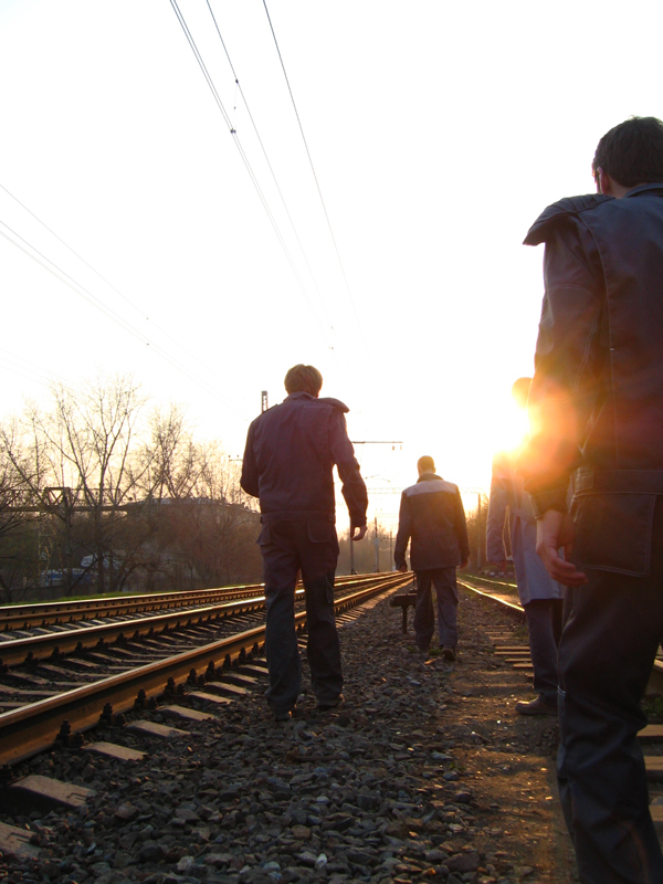 rock band HACKMESSER